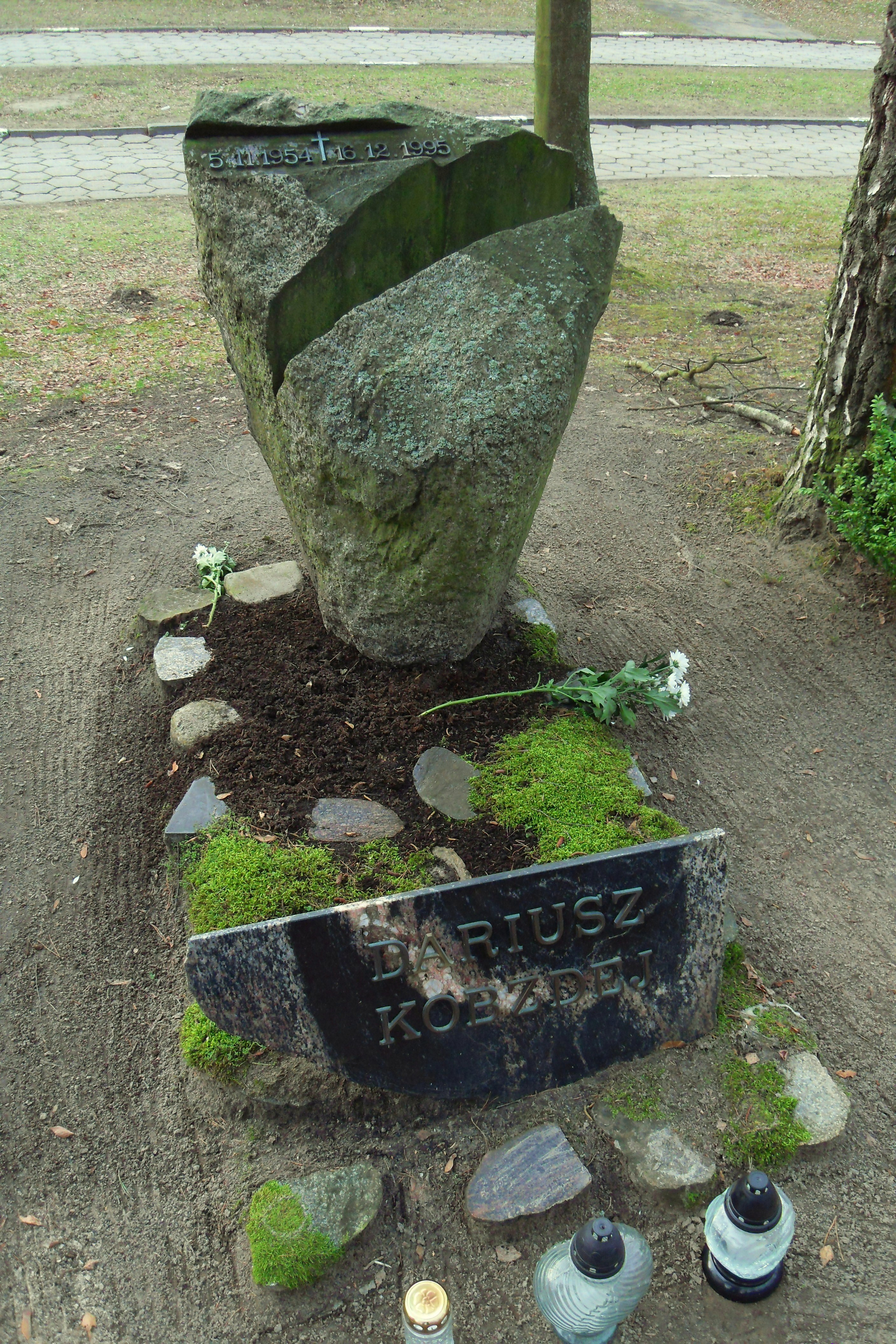 Gdańsk Wrzeszcz. Cmentarz Srebrzysko, grób Dariusza Kobzdeja.